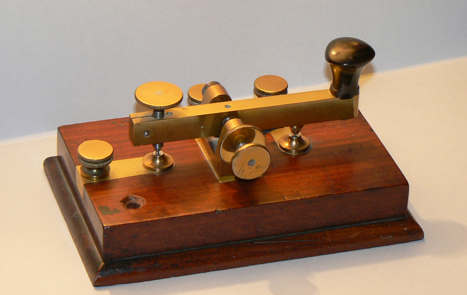 Clef télégraphique 1880. Fabrication L. Mors Paris. coll. F6BLK